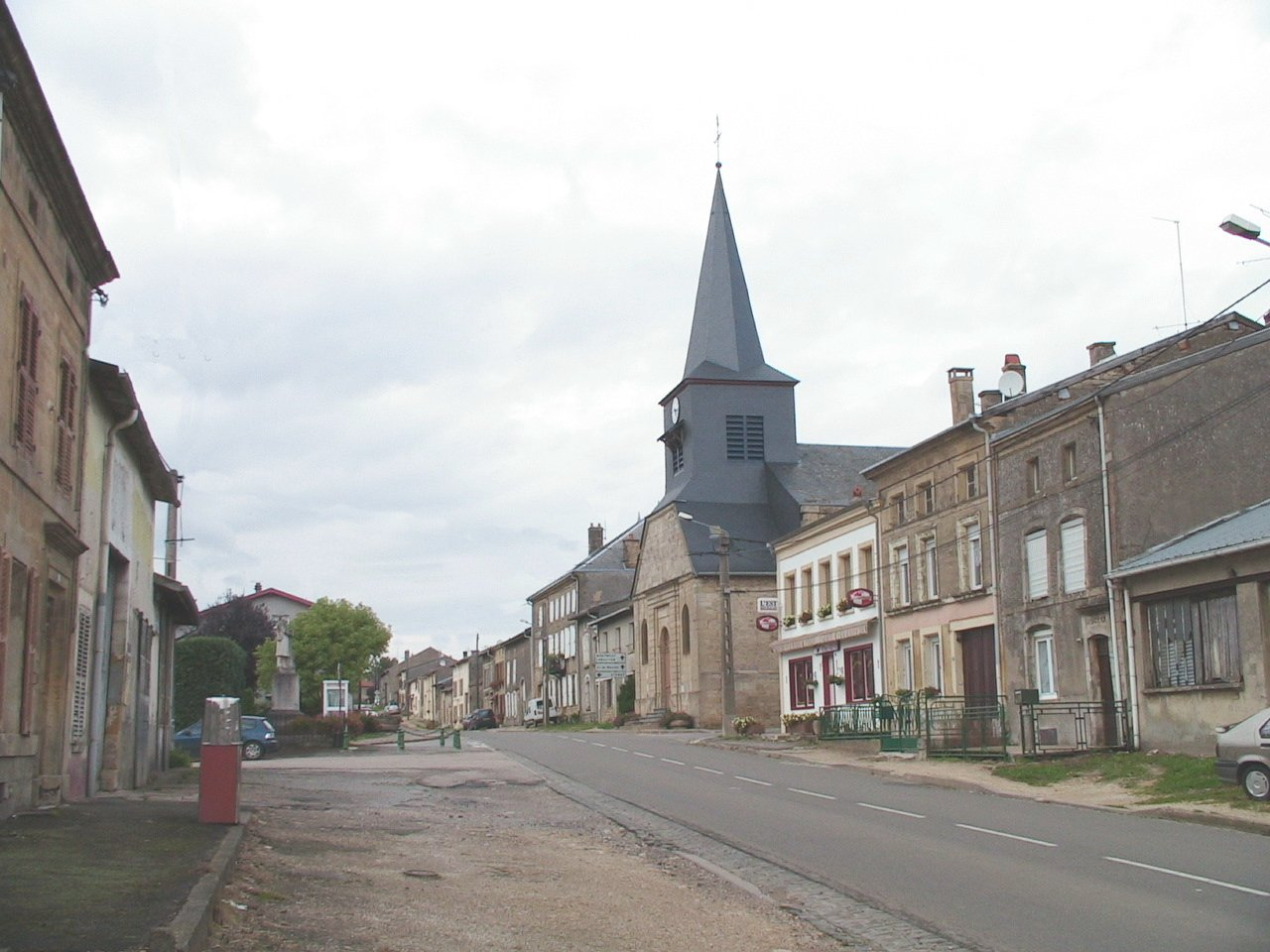 Village de Jametz (Meuse), la rue principale et l'église Photo prise en automne 2005 par F5ZV Licensing Catégorie:Image de commune de la Meuse